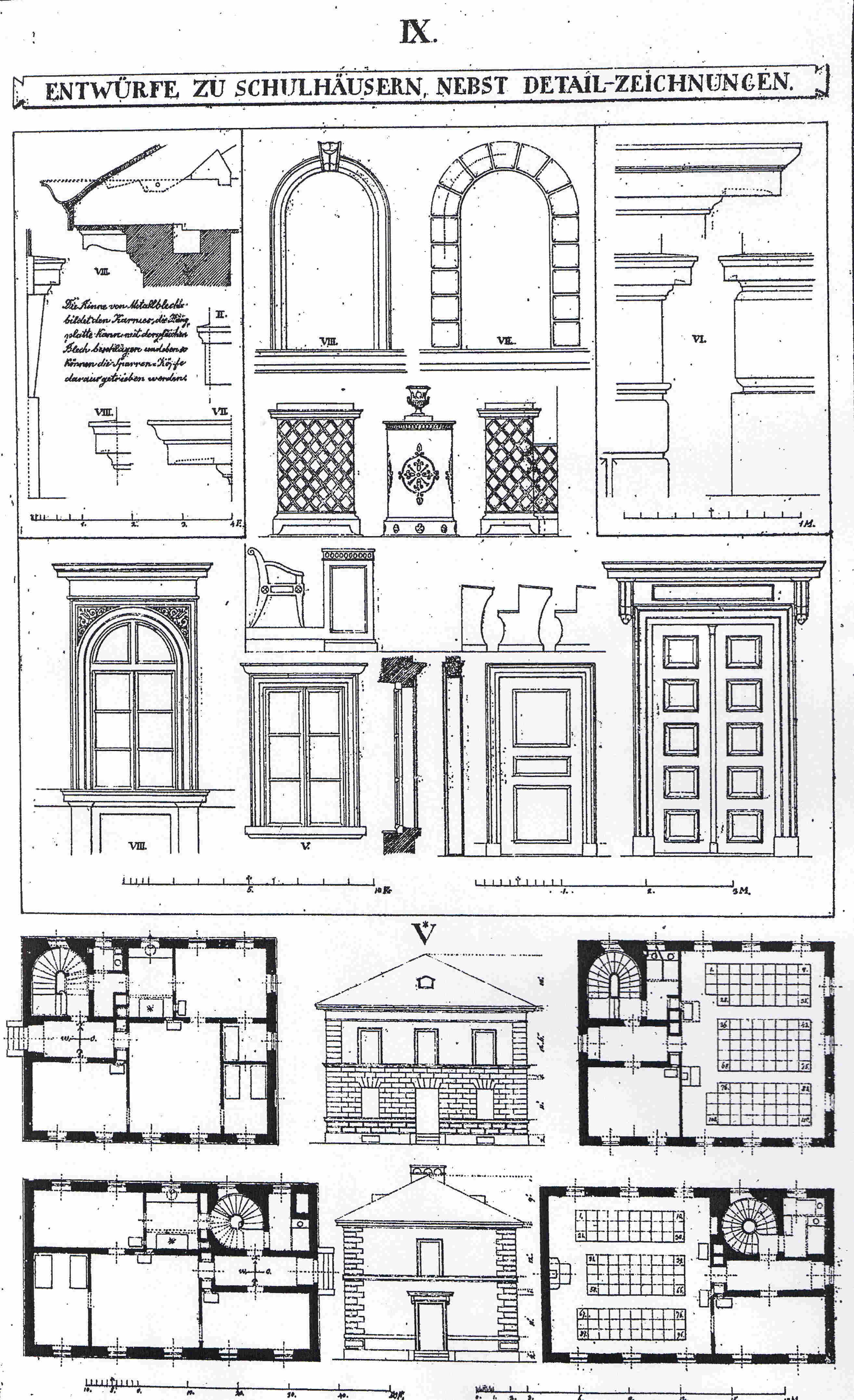 Detailentwürfe zu Schulhäuser aus Monatsblatt für Bauwesen und Landesverschönerung, München, März 1821